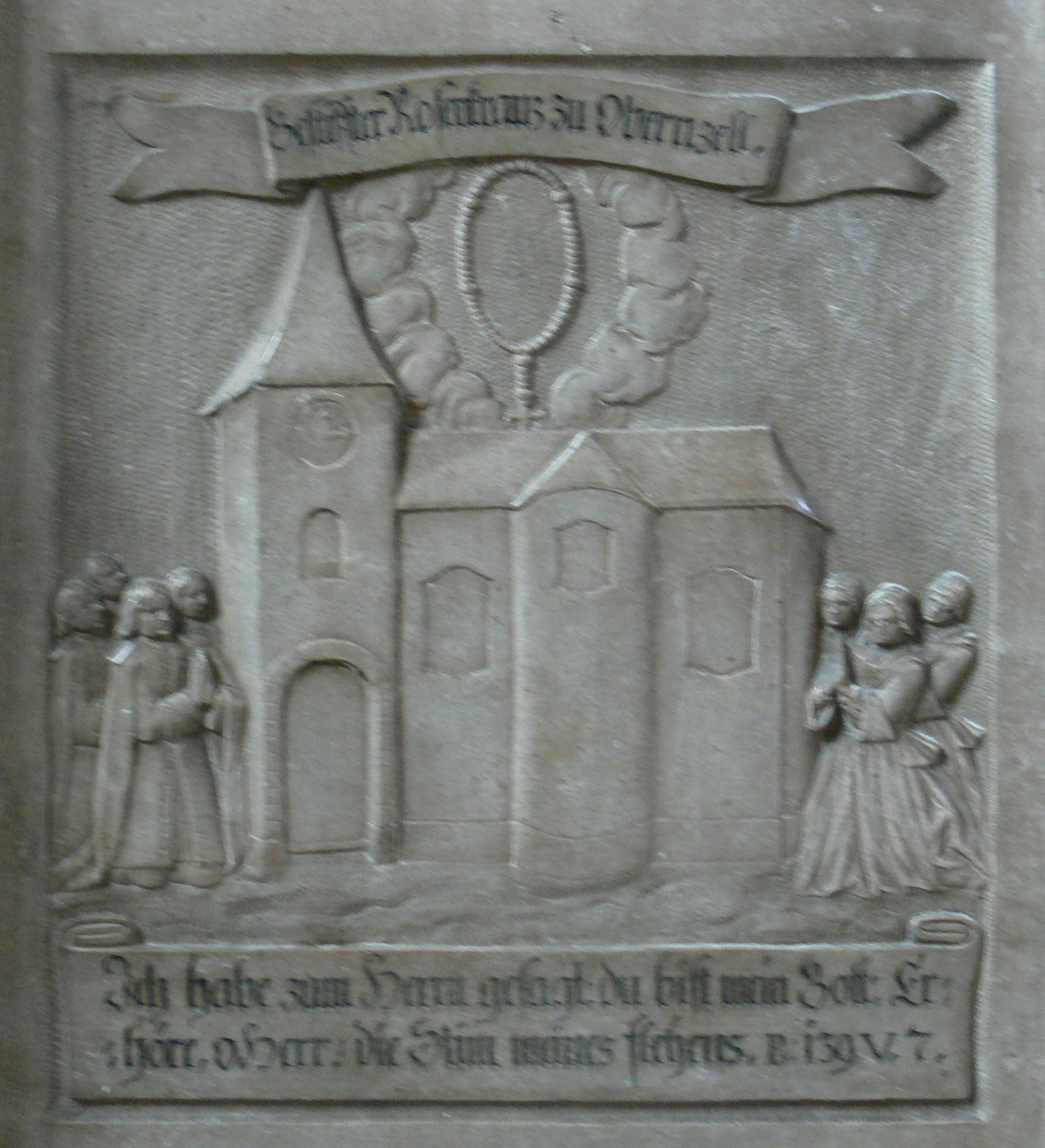 Passau, Stadtpfarrkirche St. Paul Epitaph des Lukas Kern, Detail Text: Gestiffter Rosenkranz zu Obernzell Ich habe zum Herrn gesagt: du bist mein Gott. Erhöre, o Herr, die Stim meines flehens. Ps. 139 V. 7. Psalm 140, 7 heutiger Zählung